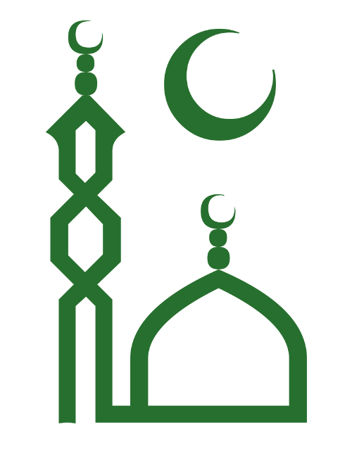 Logo Centrum Muzułmańskie w Krakowie